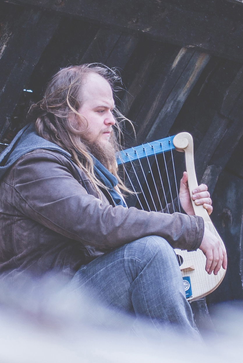 Ar Bard (Julian Cuvilliez) à la lyre celtique en 2016.